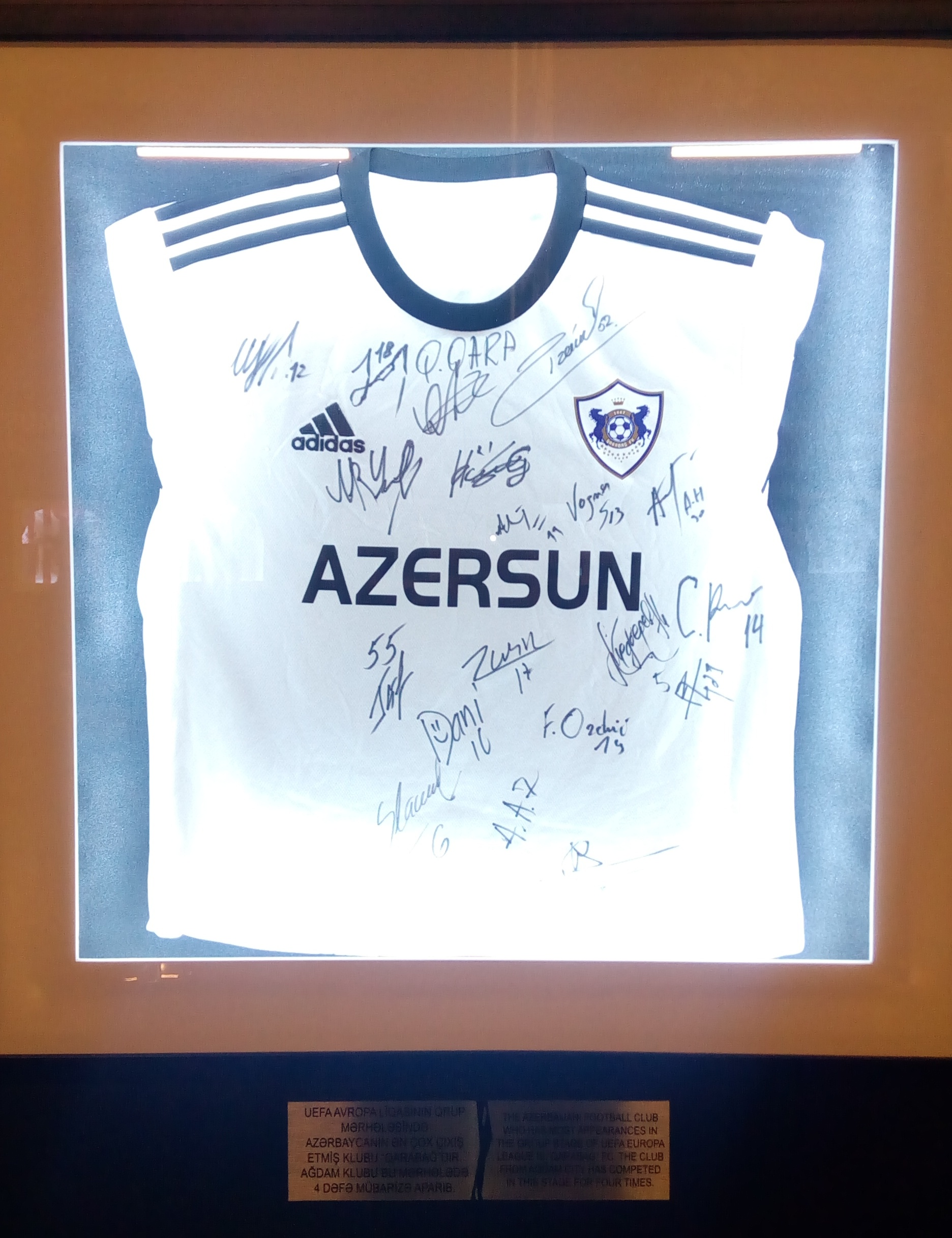 Avropa Liqası Muzeyi Bakıda